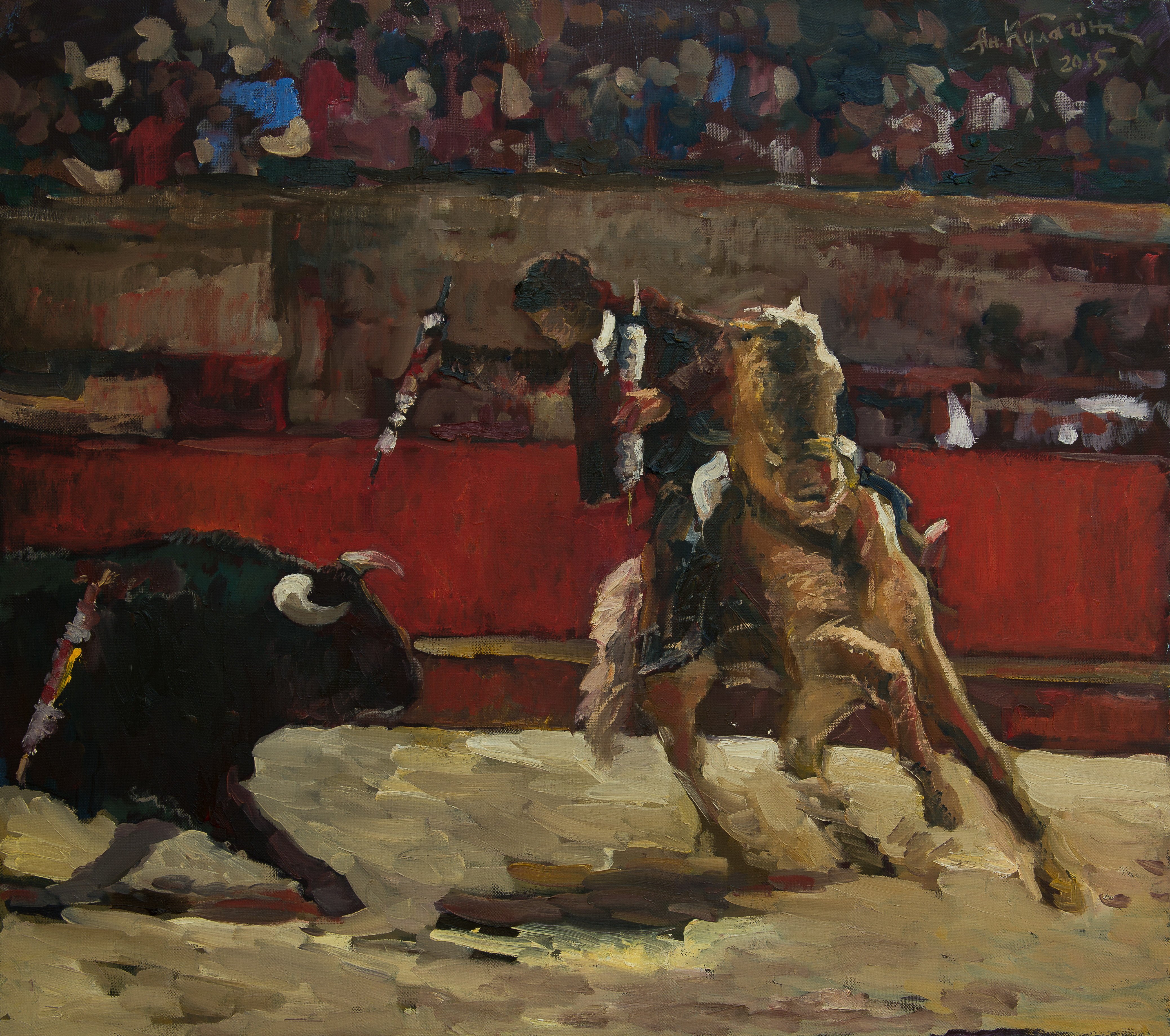 Painting by Andrey Kulagin from the cycle "Bullfight"